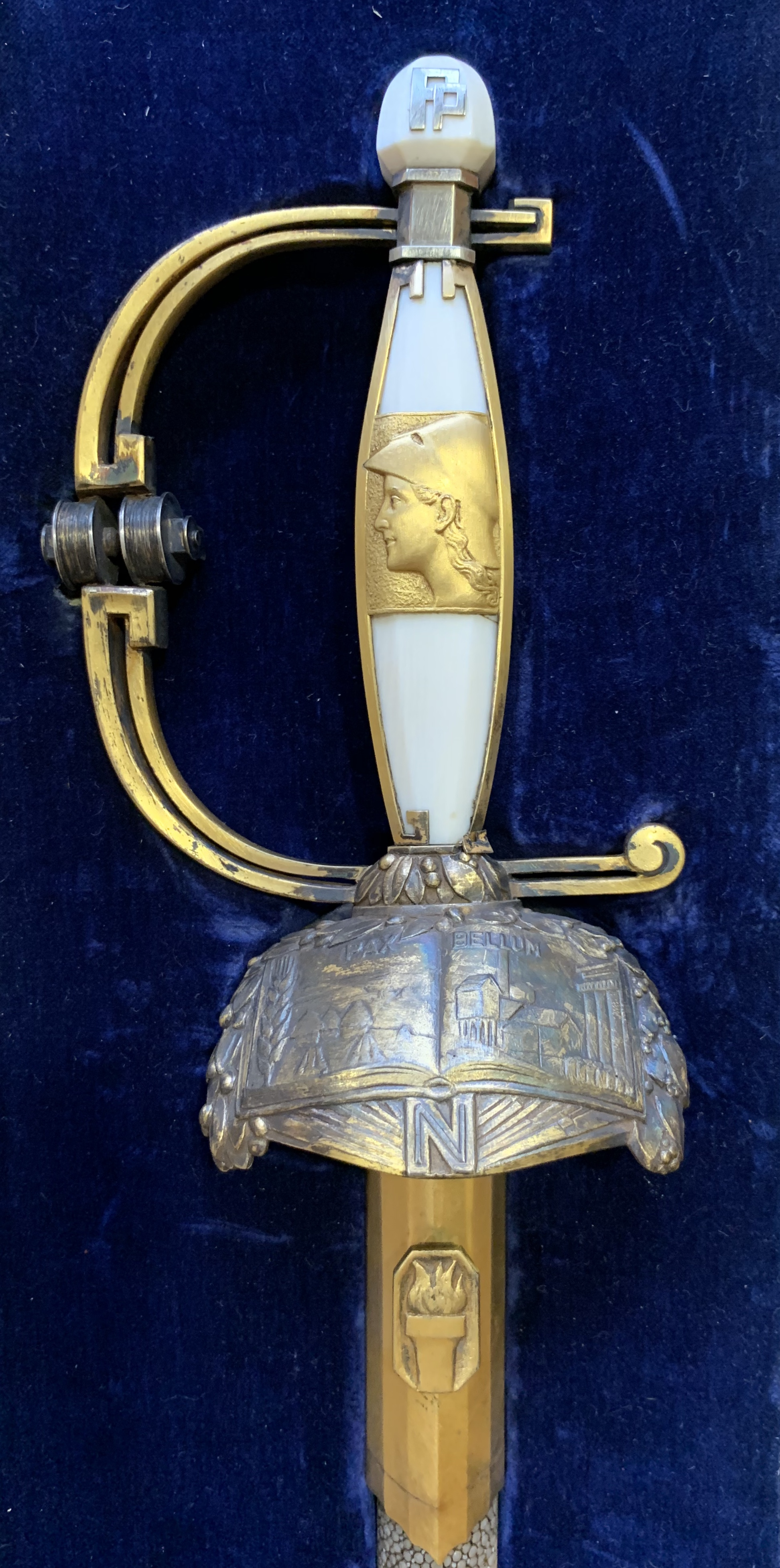 Cette épée d'académicien a été photographiée au Centre de Rercherche Paul Pascal de l'Université de Bordeaux à Pessac (Gironde).